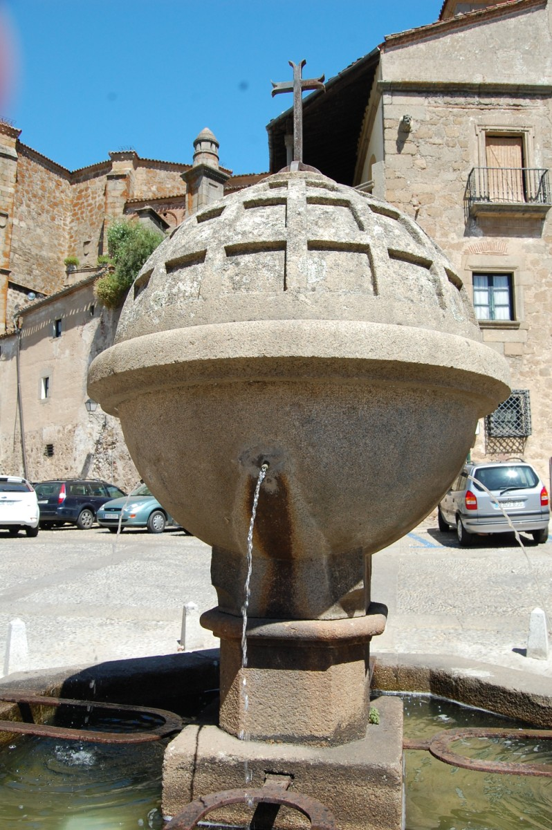 LA MUY NOBLE Y LEAL..NIKON D40 026